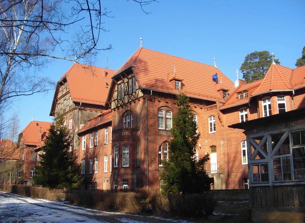 Sanatorium w Bydgoszczy-Smukale; wchodzi w skład Kujawsko-Pomorskiego Centrum Pulmonologii w Bydgoszczy